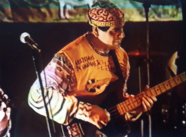 Chico Machado, da Banda Aristóteles de Ananias Jr, em show no bar Porto de Elis